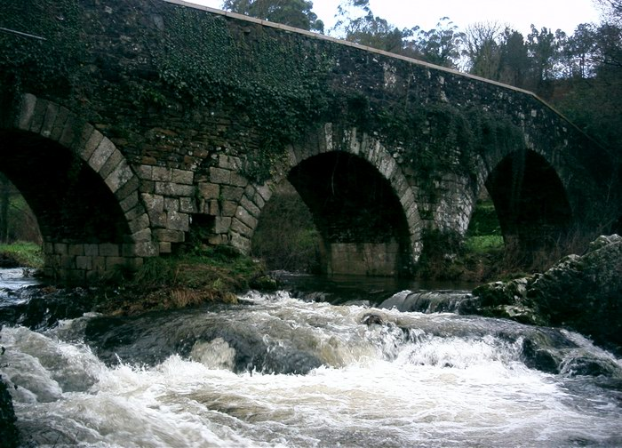 Rio Furelos, Melide municipality, Spain